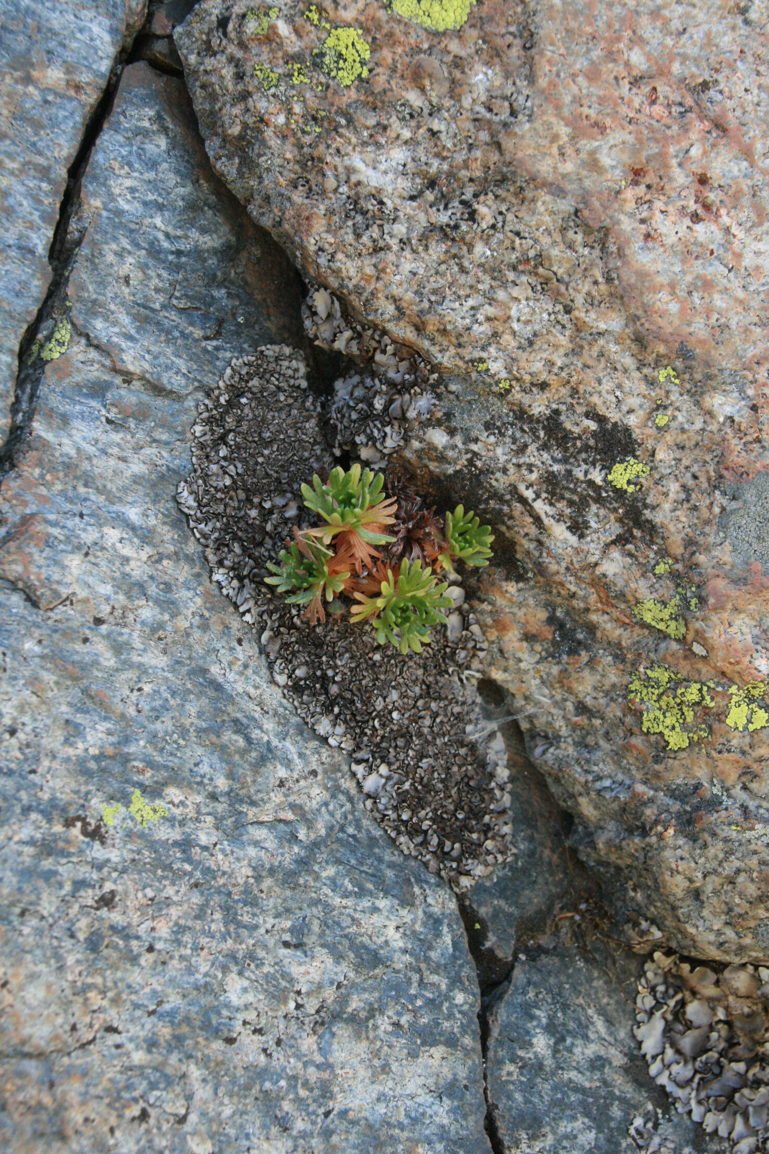 Flora en las inmediaciones de la Laguna Grande del Circo de Gredos en la Sierra de Gredos. España